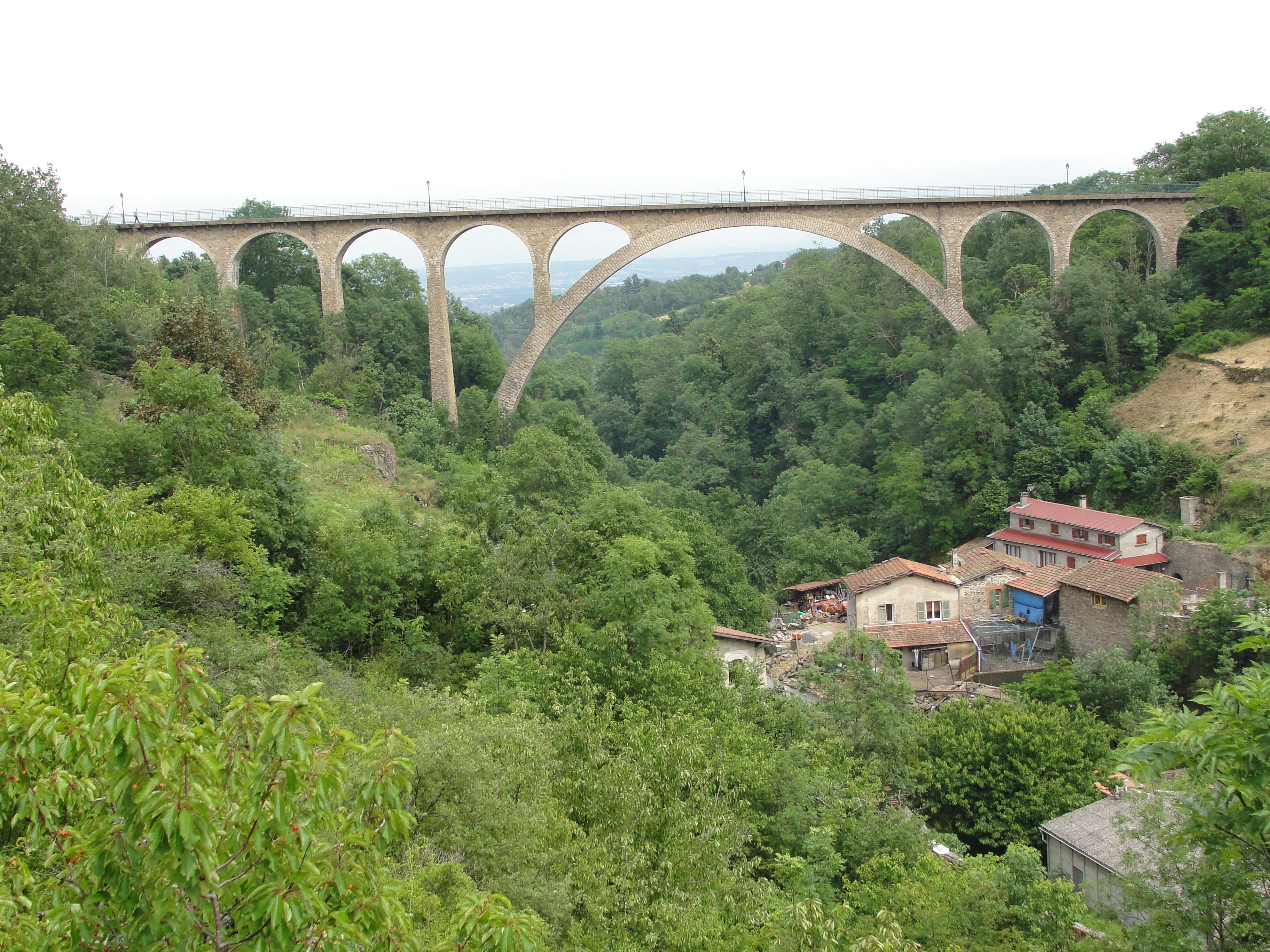 Grand viaduc de l'ancien tacot de Pélussin (Loire). Long de 170 m et haut de 58, c'est aujourd'hui une voie piétonne. Il y a un 2e viaduc à droite dans le prolongement, de dimensions plus modestes (non visible sur photo).